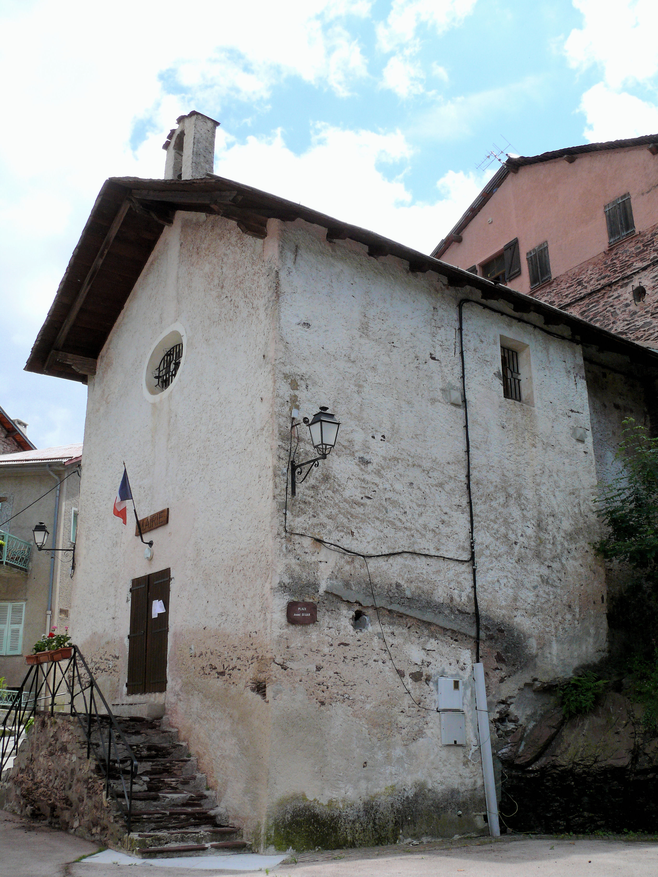 Roure - Mairie dans une ancienne chapelle